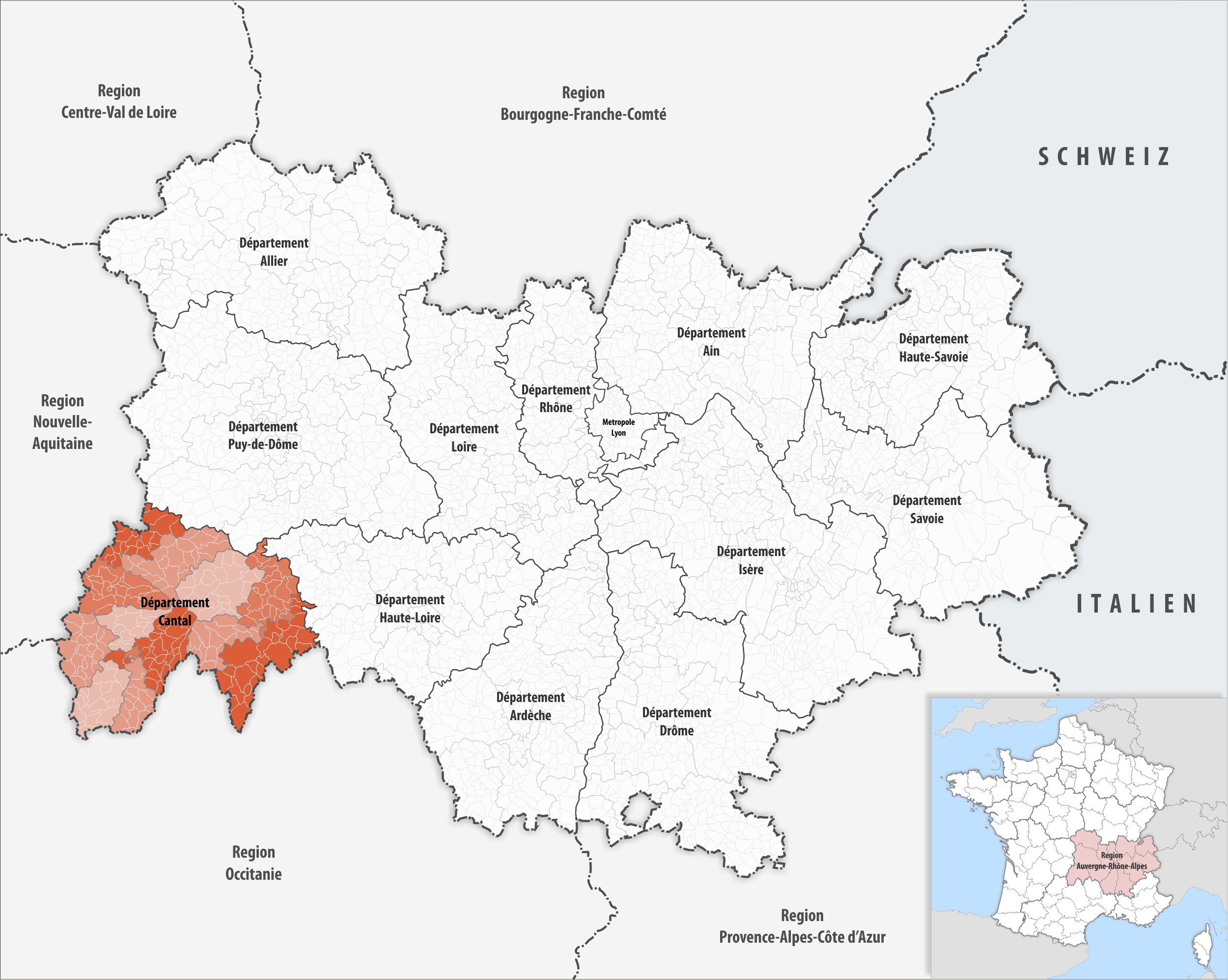 Lage des Departements Cantal